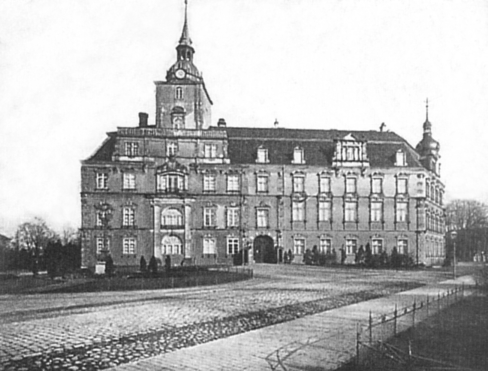 Oldenburger Schloss